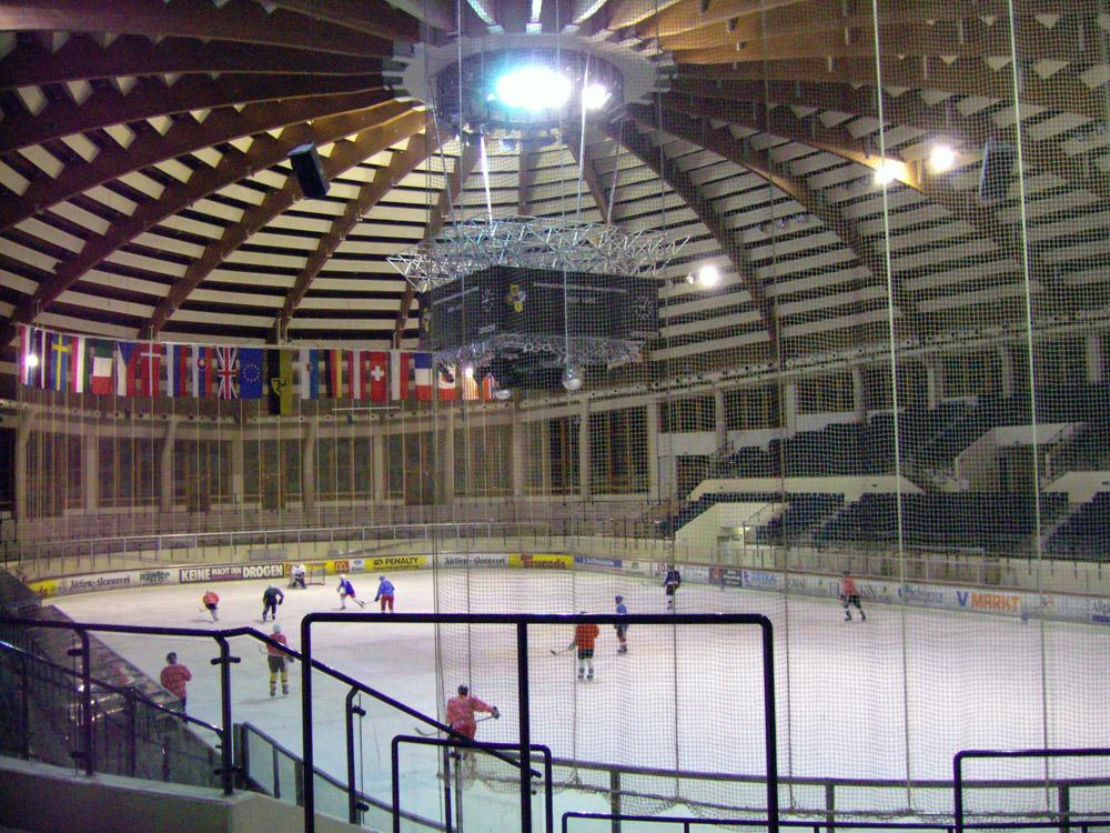 Das BLZ in Füssen